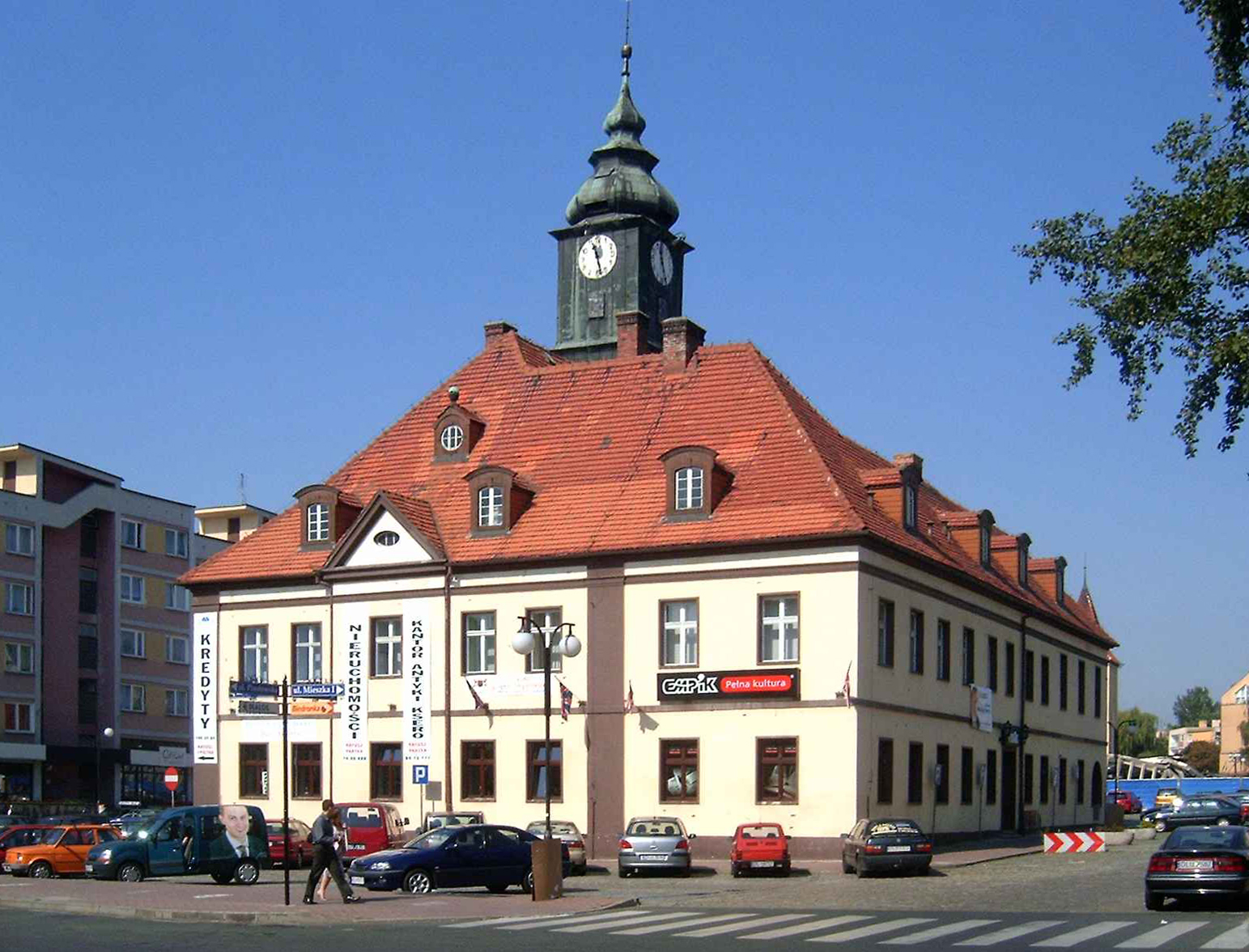 Lubin - ratusz